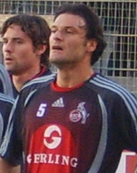 Alpay, 1.FC Köln